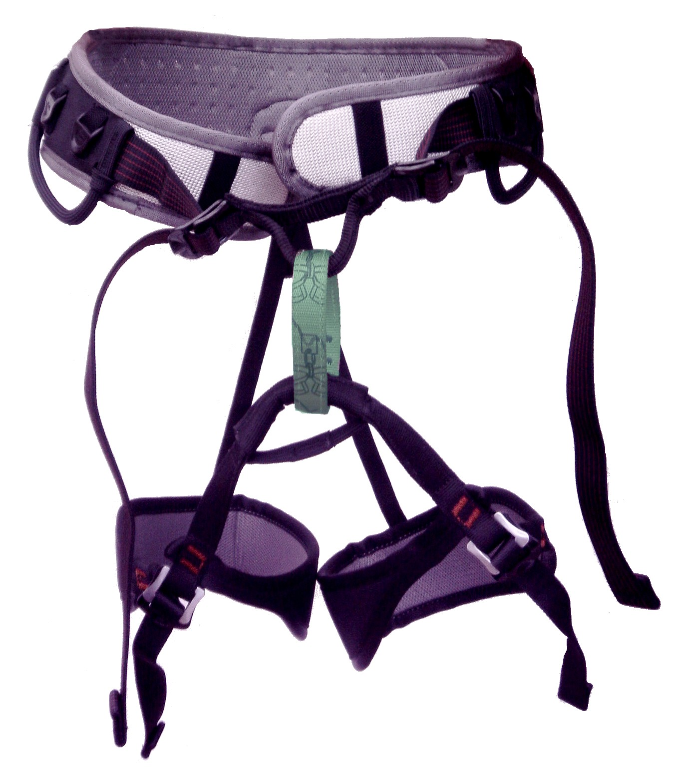 Baudrier CORAX de marque PETZL.